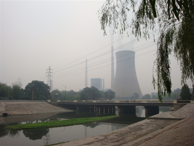 中文（中国大陆）: 河北省唐山市